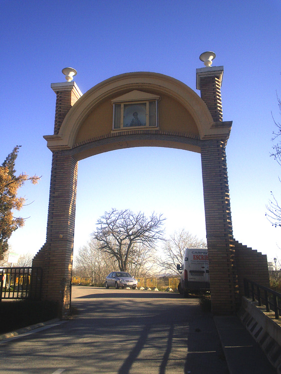 Puerta de acceso a la zona de cultivo llamada La Mejana, en Tudela Navarra España autor user:papix